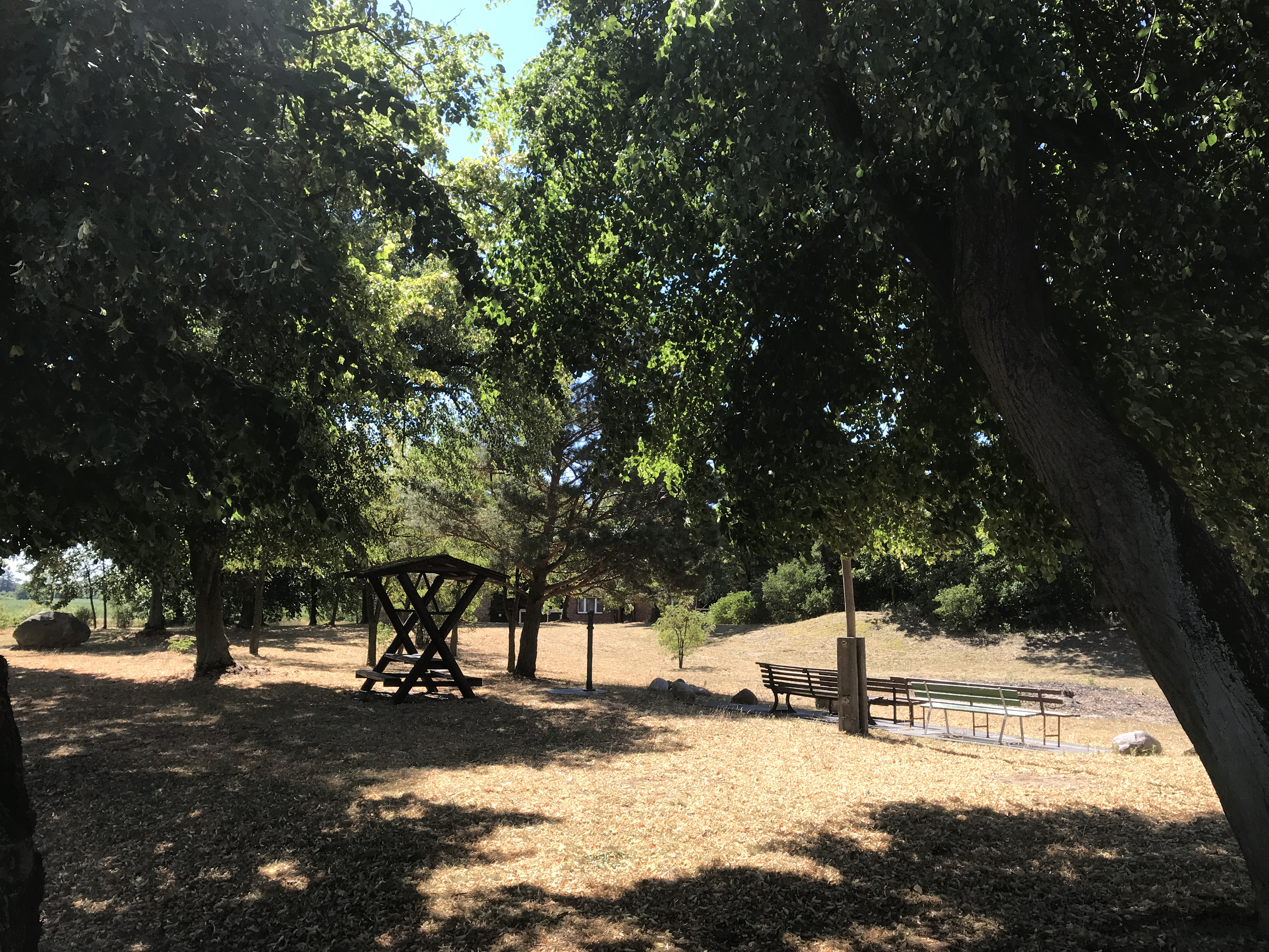 Dorfanger von Friedrichshof, einem Ortsteil der Gemeinde Rietzneuendorf-Staakow im Landkreis Dahme-Spreewald im Land Brandenburg